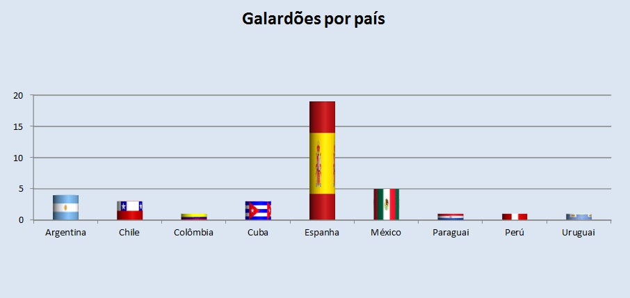 Gráfico dos galardões por país do prémio Cervantes.